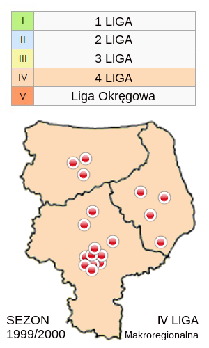 Jagiellonia Białystok w sezonie 1999/2000 -mapka